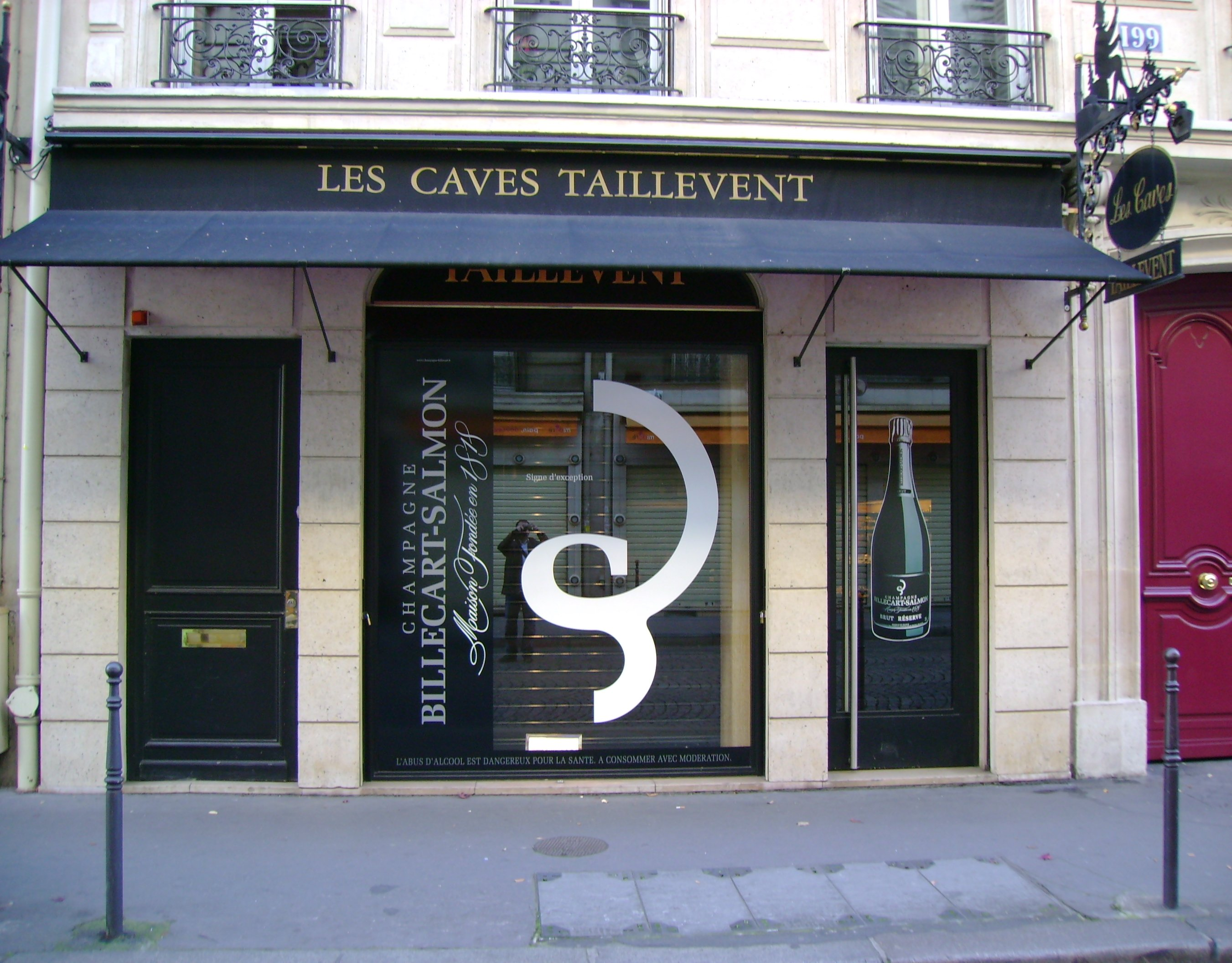 Anciennes Caves Taillevent (définitivement fermés pour aménager en face au no 228), 199 rue du Faubourg Saint-Honoré, Paris, France